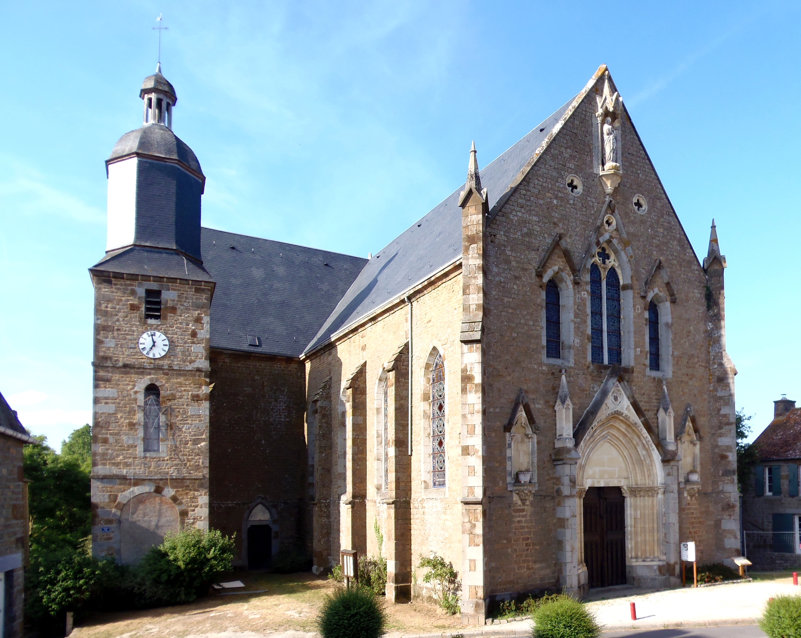 La Carneille (Normandie, France). L'église Saint-Pierre-et-Saint Paul.